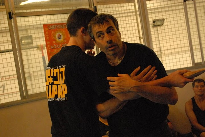 Clase de Kapap dictada por el Maestro Avi Nardia en la Argentina